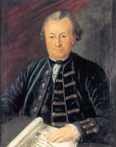 royal court gardener at Sanssouci, Potsdam, Germany